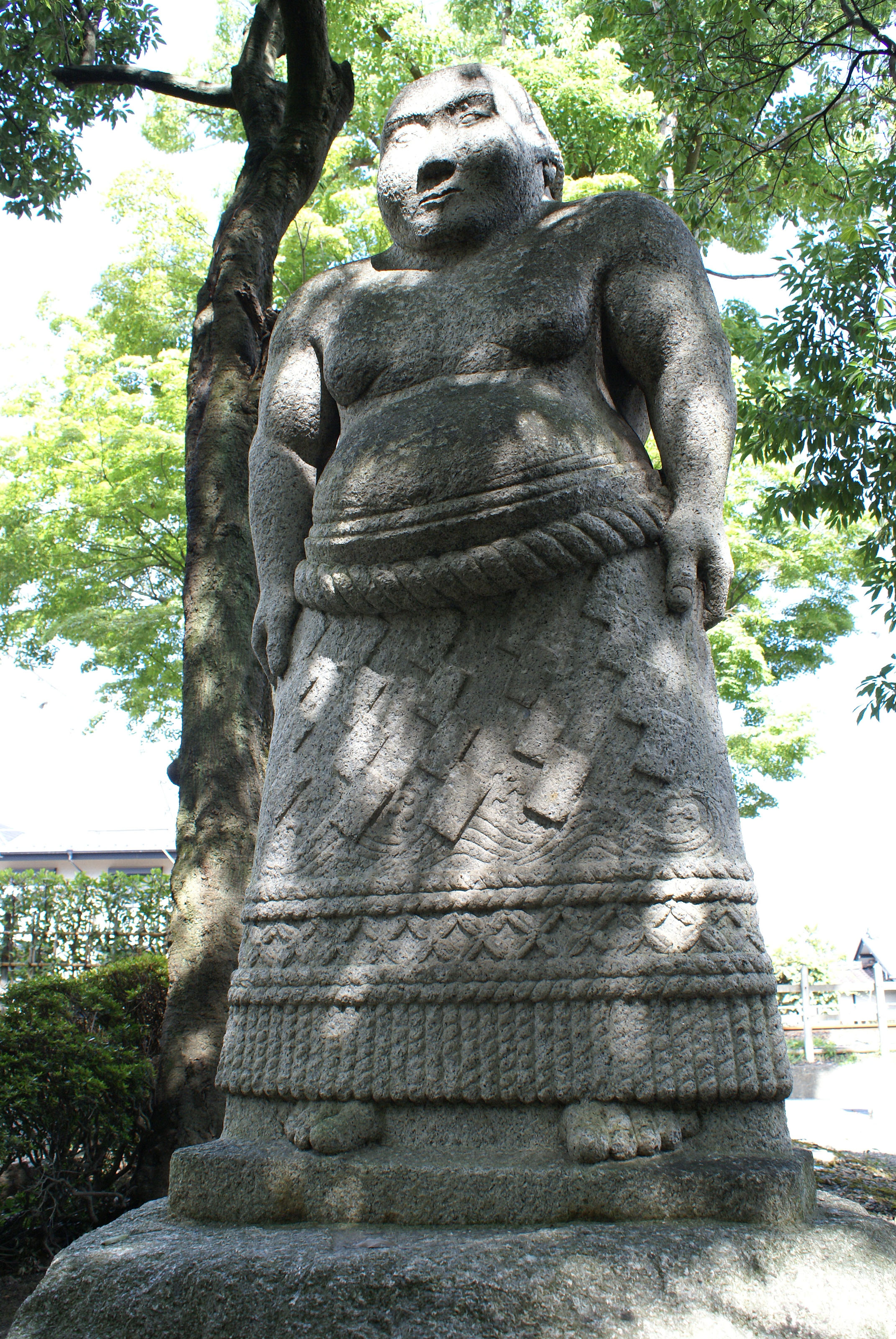 Keiunkan in Nagahama, Shiga prefecture, Japan